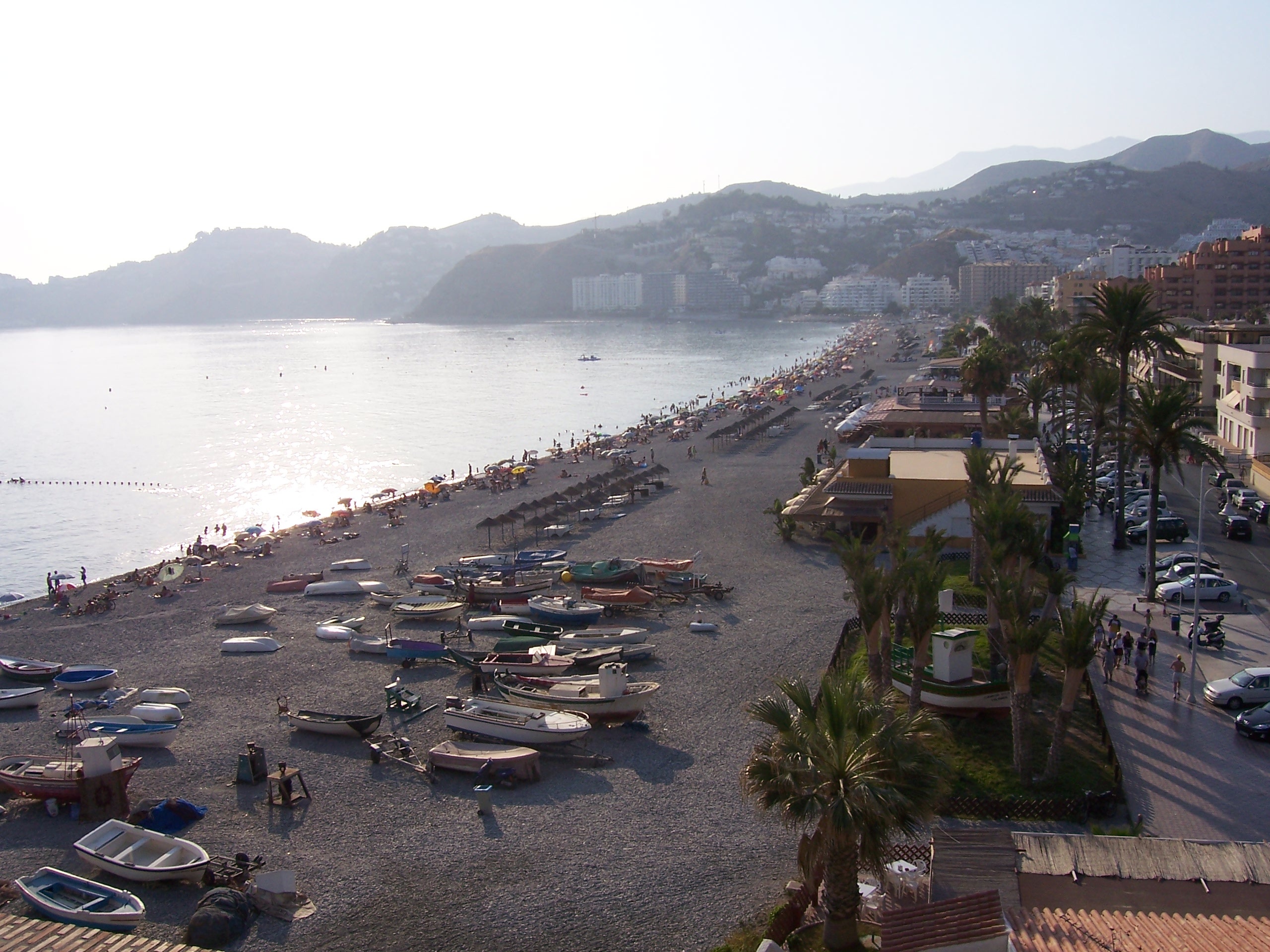 Plage d'Almuñécar, en Grenade (Espagne)